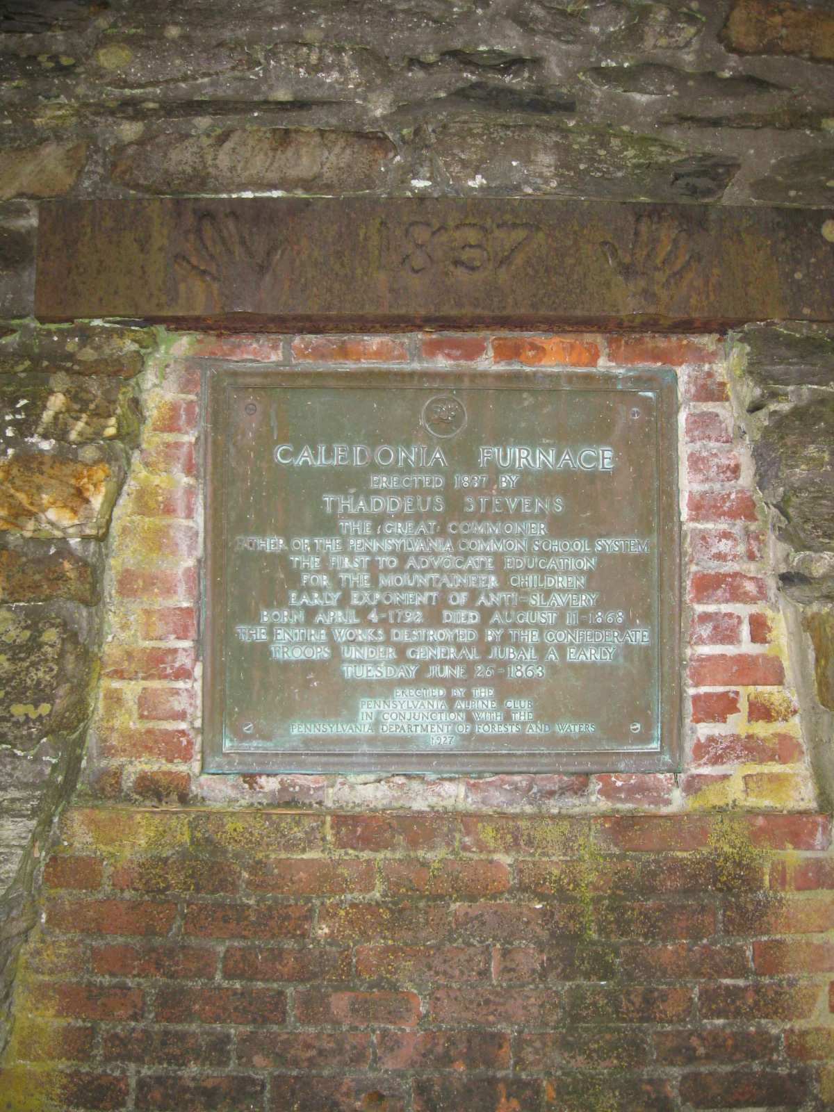 Caledonia Furnace - Pennsylvania